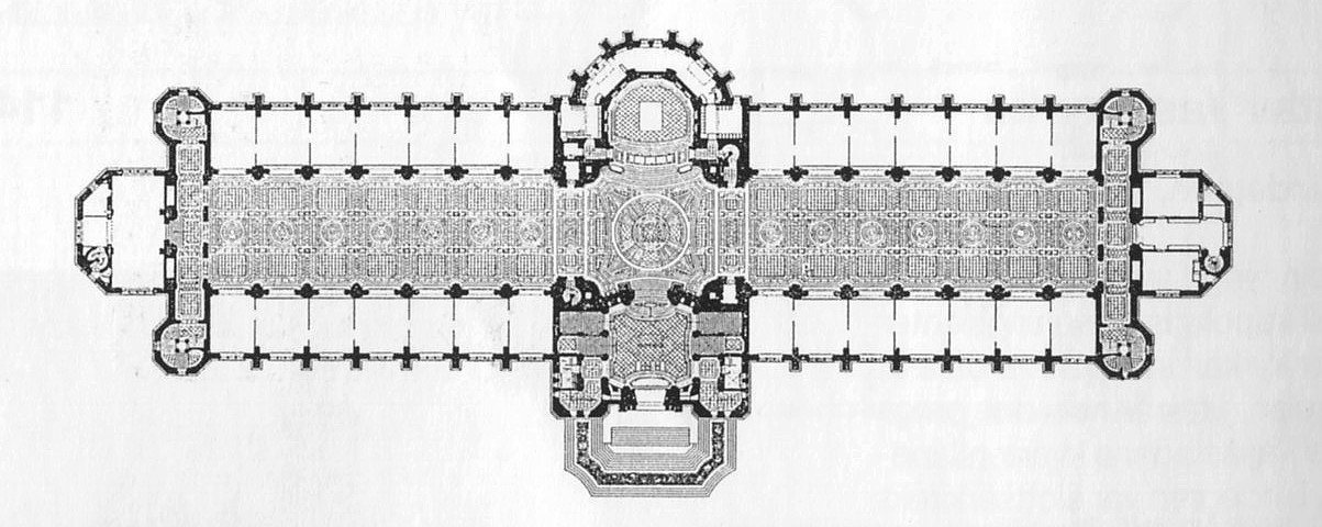 Nordiska museet planritning